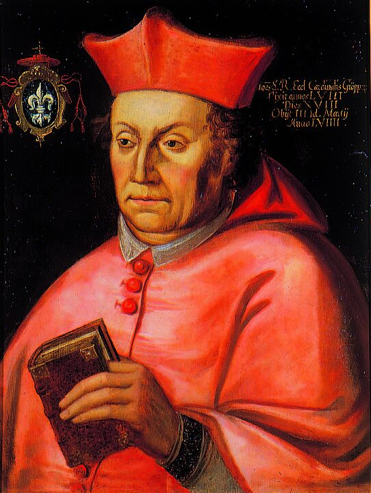 Ritratto del cardinale Johann Gropper (1555)